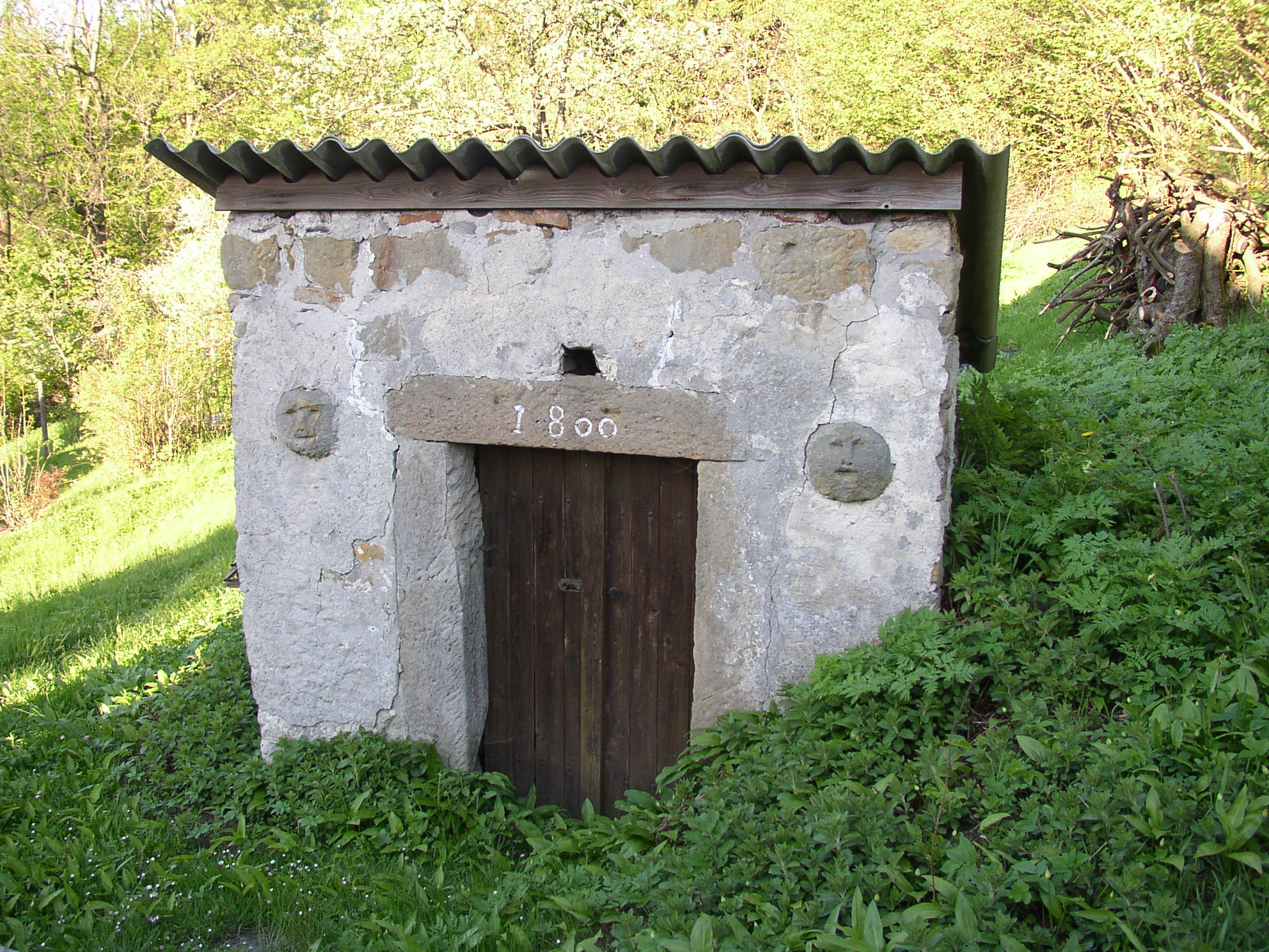 Zbytky z hradu Tolštejn v jeho okolí.Ostění a kamenné koule zazděné do vchodu podzemního sklípku - datované 1800